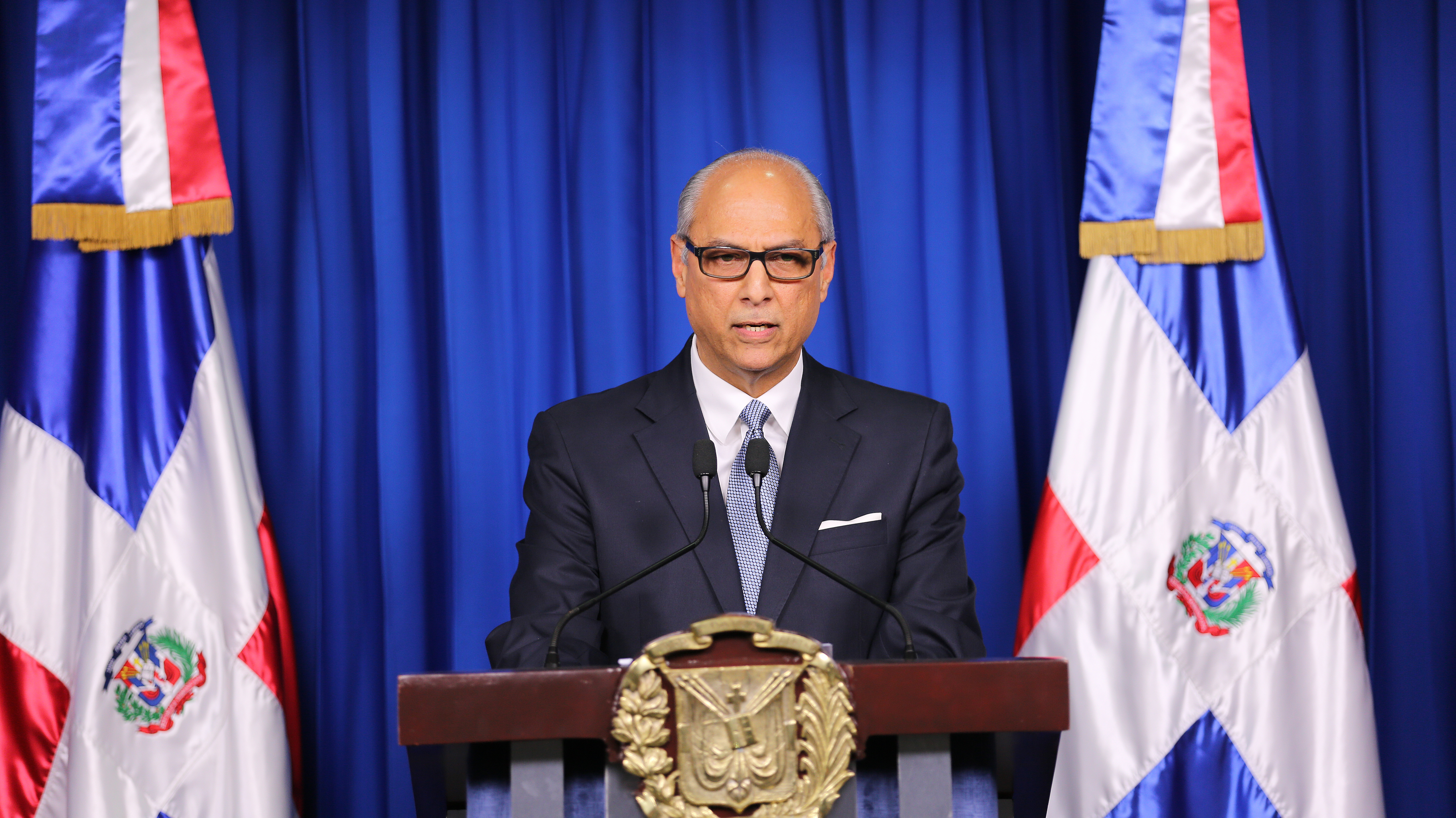 Flavio Darío Espinal en una conferencia de prensa en Santo Domingo.